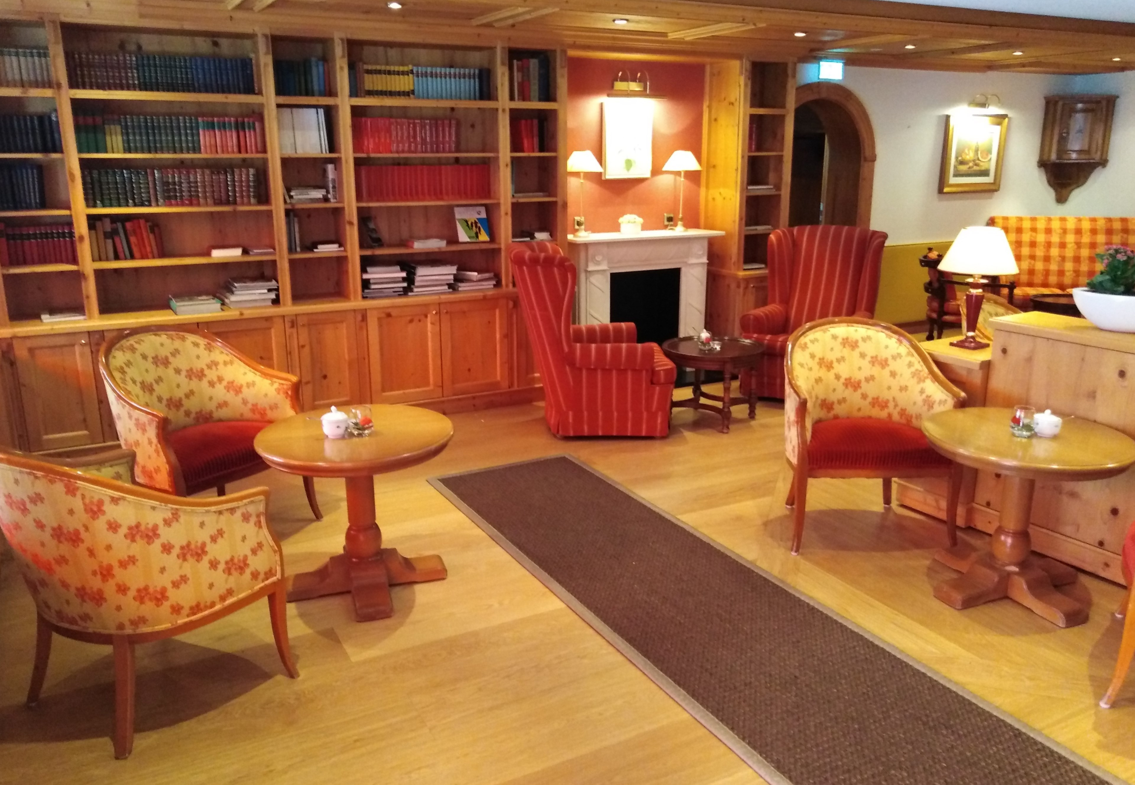 Gasthof Adler in der Gemeinde Häusern im Landkreis Waldshut in Baden-Württemberg im Südschwarzwald. Der Gasthof führt einen Doppeladler (als Schwarzwaldhaus 1596 nachweisbar). Seit 1966 wird das Restaurant Adler Häusern mit einem Michelin Stern ausgezeichnet. Es gilt als das älteste Sternerestaurant Deutschlands. Die Bibliothek (Tagungsraum).